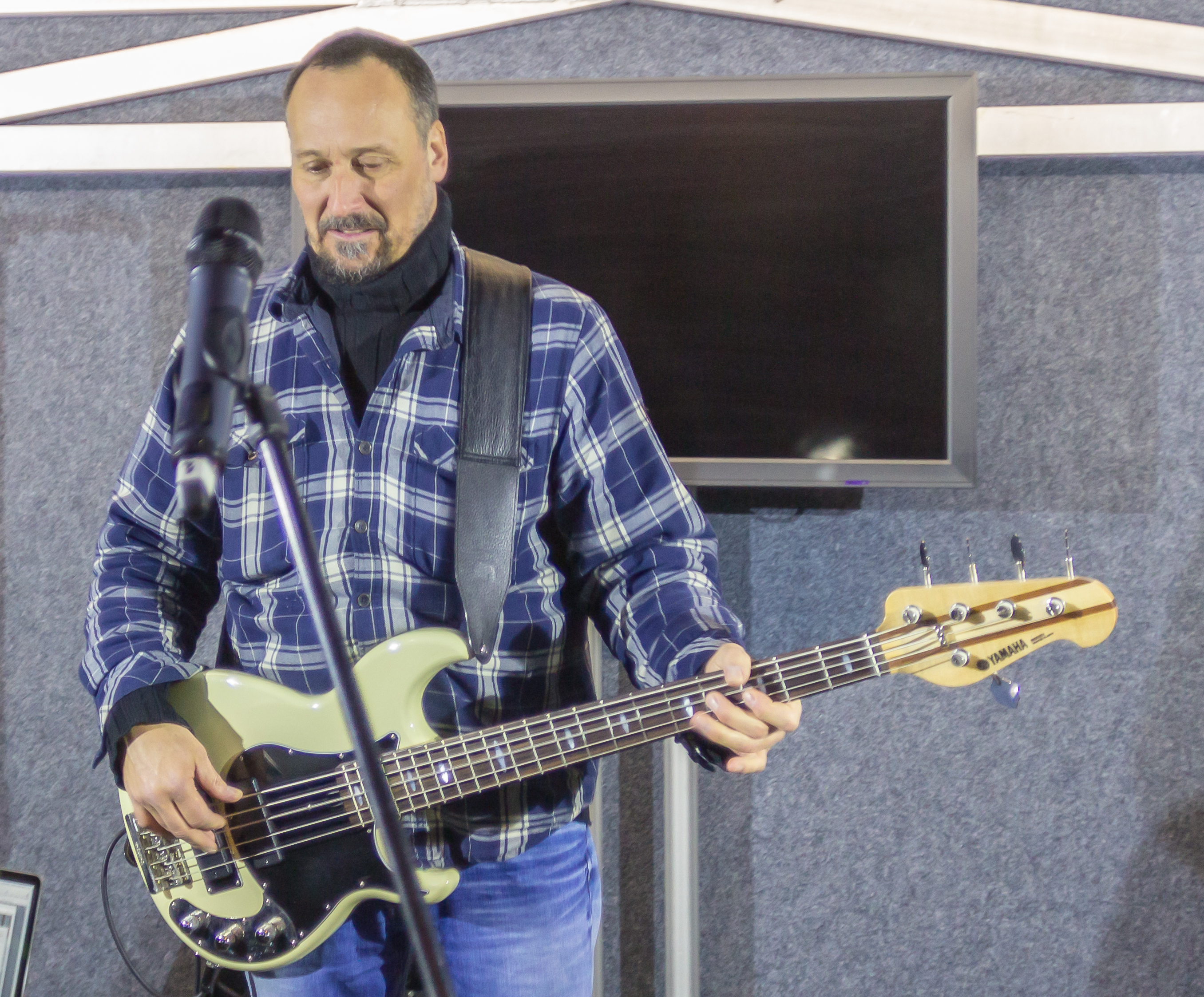 Köln stellt sich quer – Mahnwache „Wir sind Charlie – Für Freiheit und Vielfalt“ - nokögida 14. Januar 2015 Premiere des Trios „The Hands“ mit den Musikern Hans Lüdemann (Piano, nicht im Bild), Claus Fischer (Bass) und Jonas Burgwinkel (Schlagzeug, nicht im Bild)